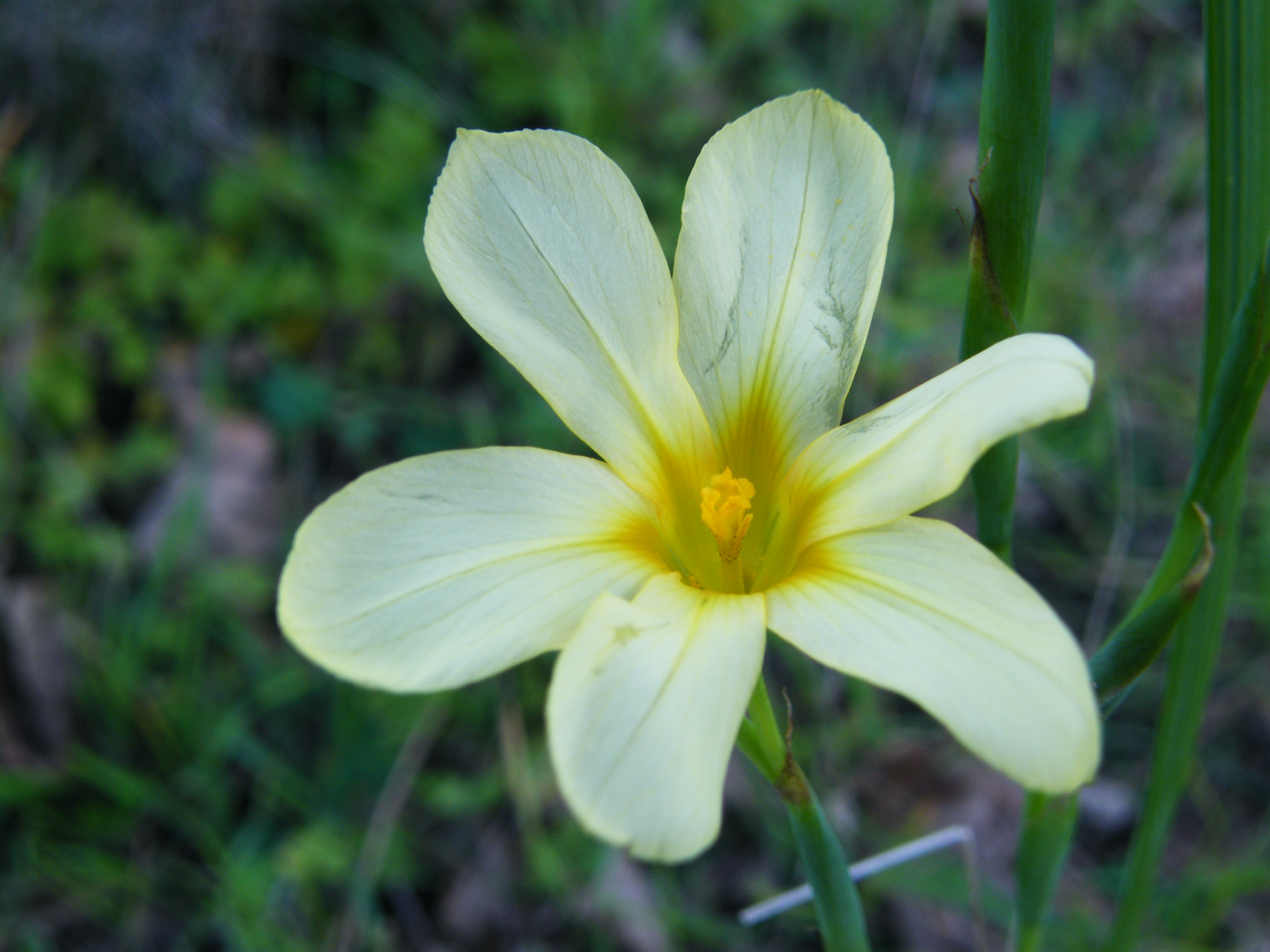 groottulp